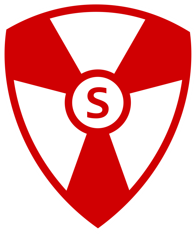 Logo powstałego w 1950 r. Zrzeszenia Sportowego Spójnia (związków sportowych ruchu spółdzielczego). Było używane przez wiele klubów głównie w latach 50-tych XX wieku.